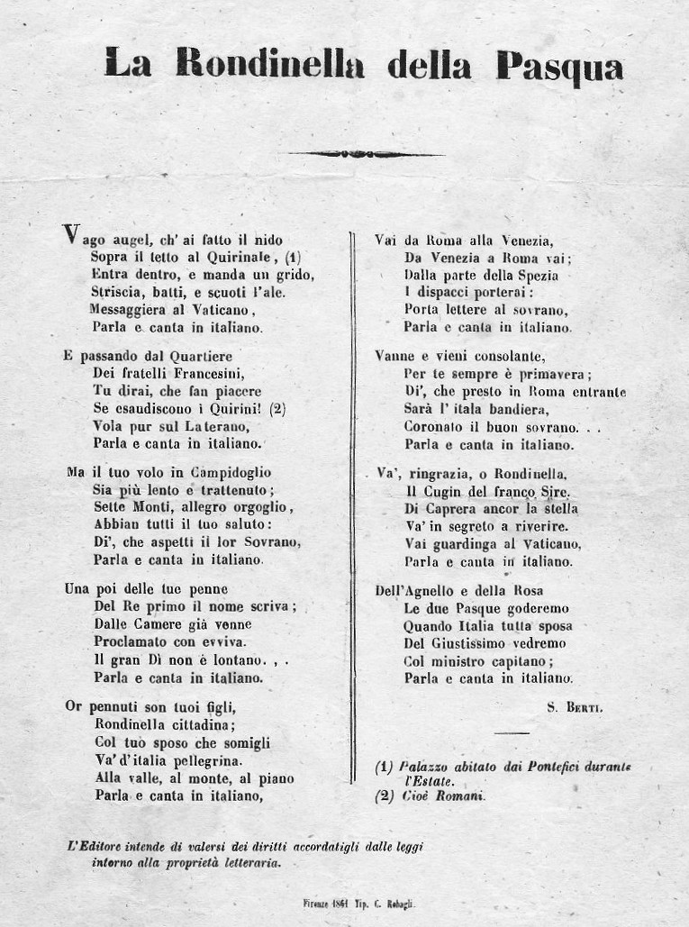 Poesia patriottica del 1861 sulla base della Rondinella pellegrina di Tommaso Grossi